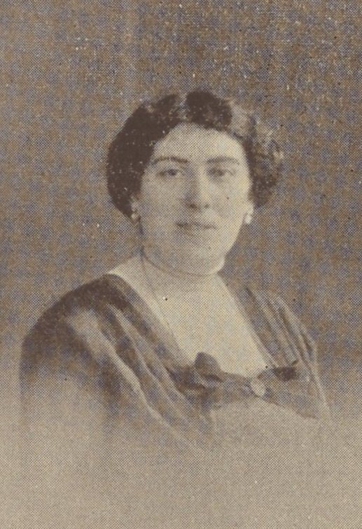 Regina Fels, edzino de d-ro Izrael Fels. Partoprenanto de UK 1912 el la albumo VIII. Universala Kongreso Esperantista.